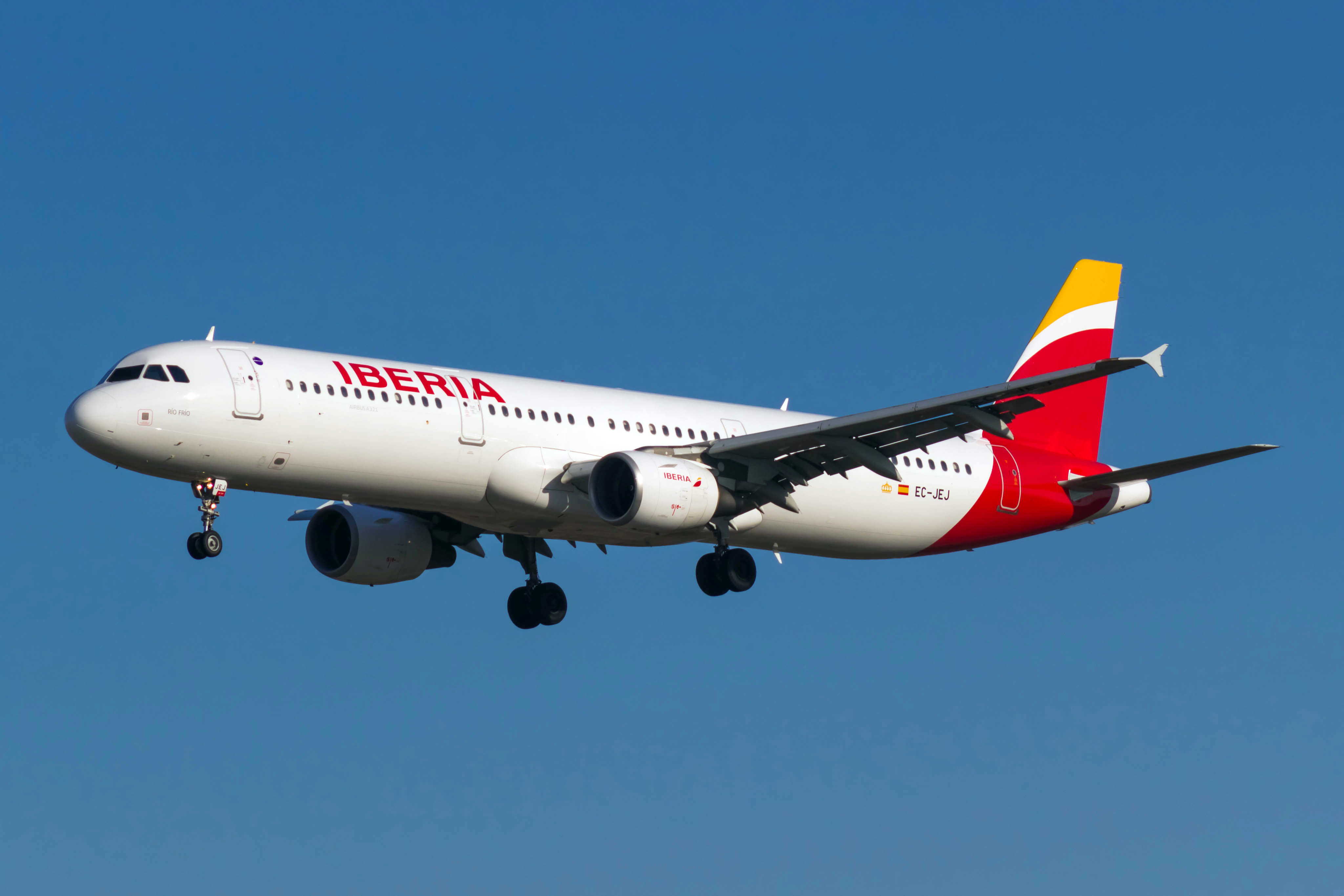 Airbus A321 de Iberia aterrando no aeroporto de Barcelona.